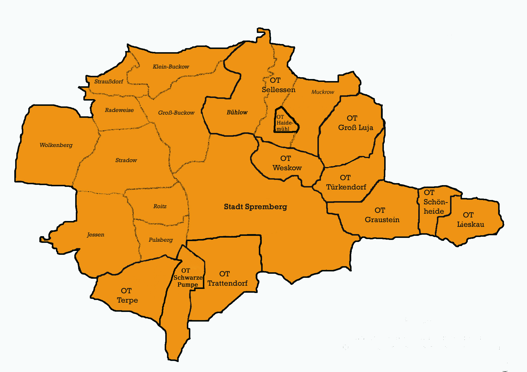 Stadtgebiet der Stadt Spremberg Stand Juli 2009